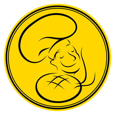 logo roti bunz